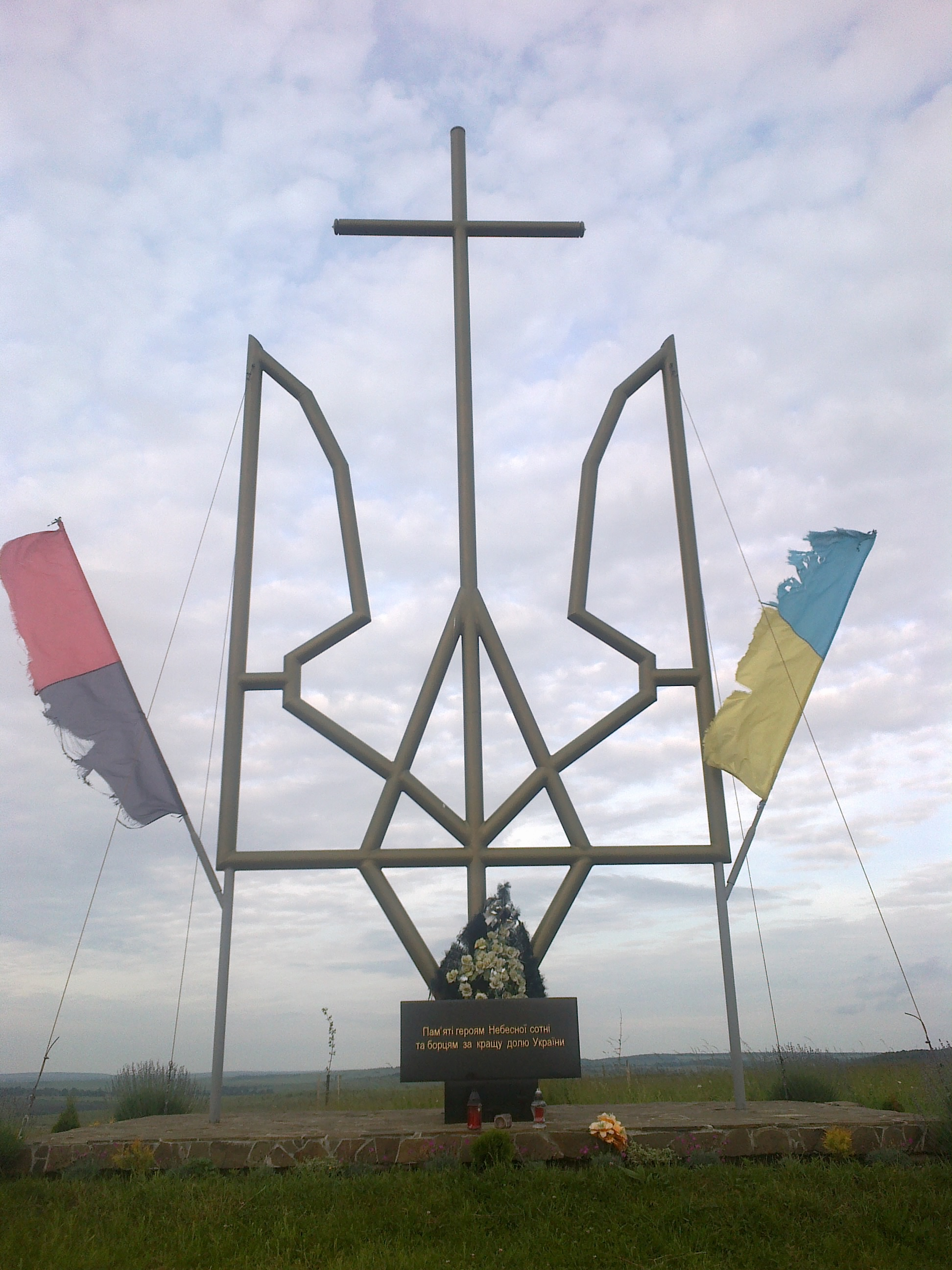 Пам'ятник на горі Циганка